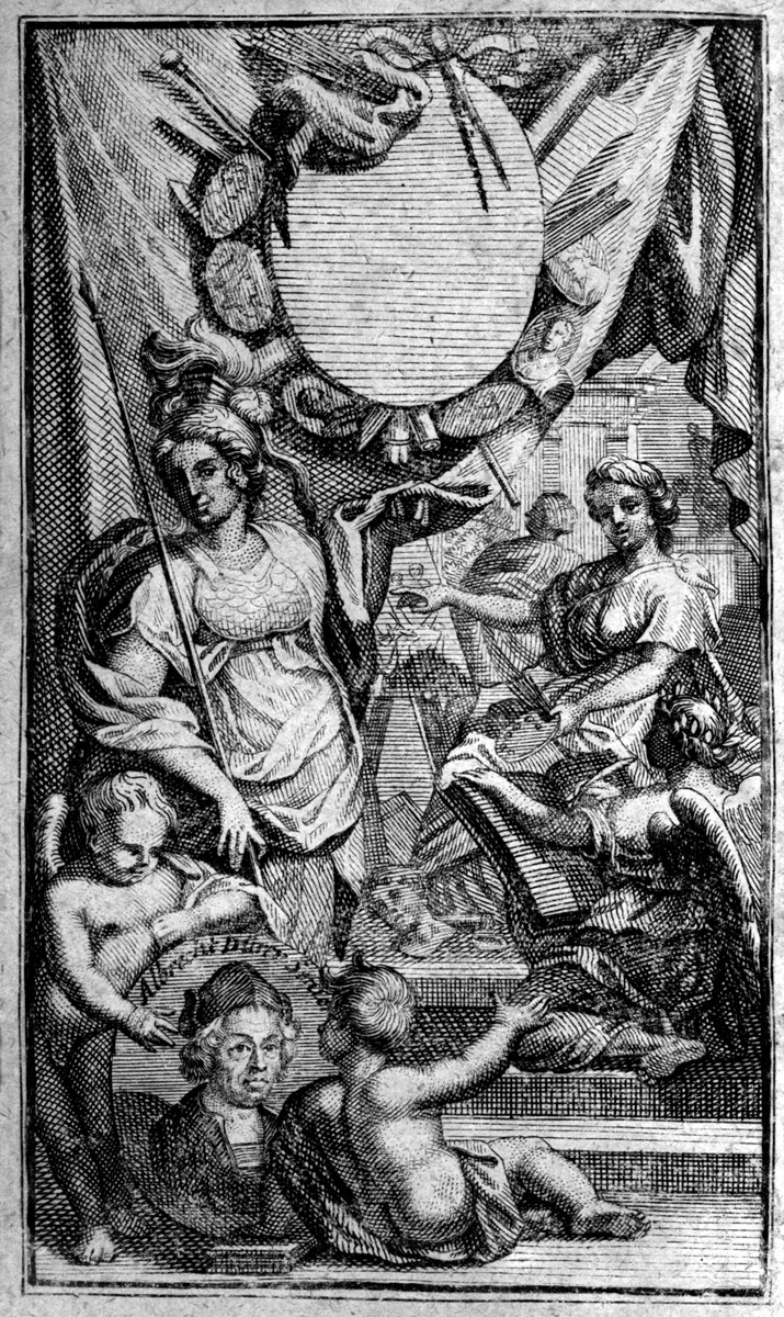 Frontispiz zu: Roger de Piles: Historie und Leben der berühmtesten europäischen Mahler, Hamburg, Benj. Schiller, 1710